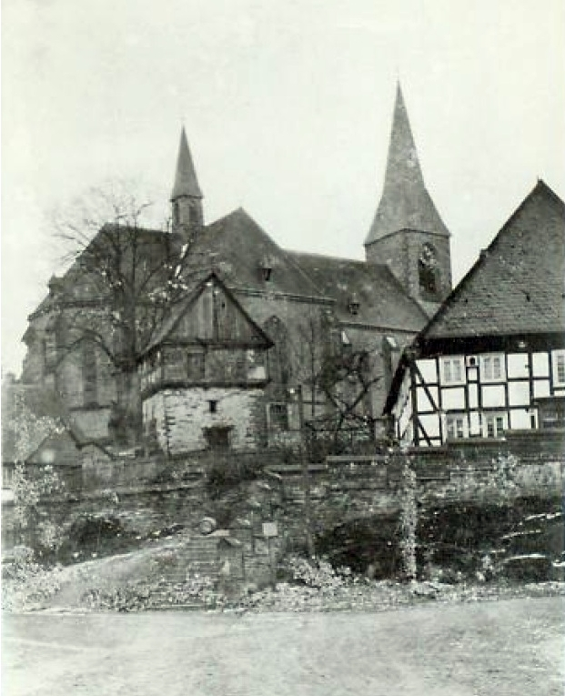 Die Kirche in Assinghausen, Ansicht vom Ende des 19. Jahrhunderts